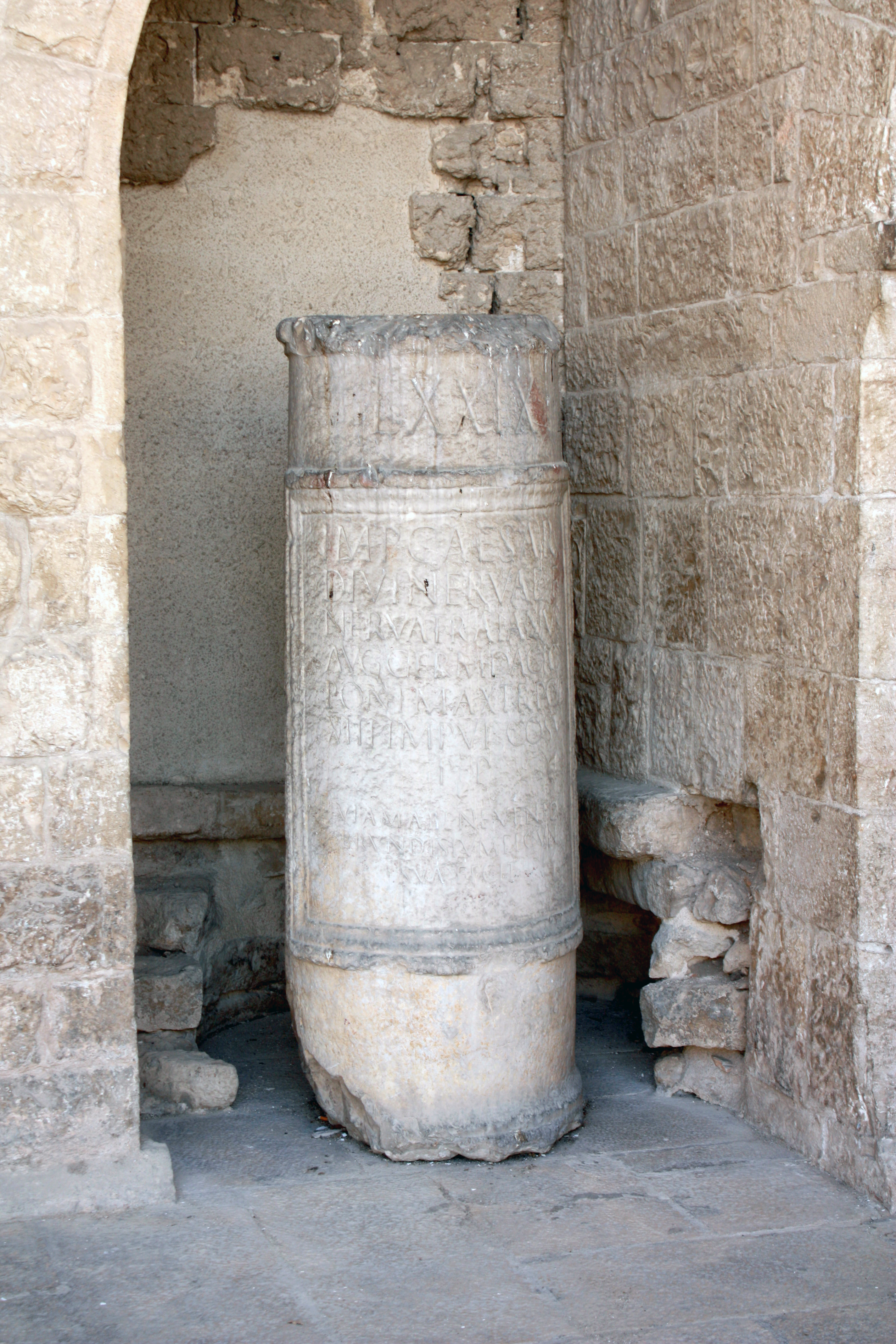 Castello di Barletta - Colonna miliare di Canne conservata nel castello di Barletta